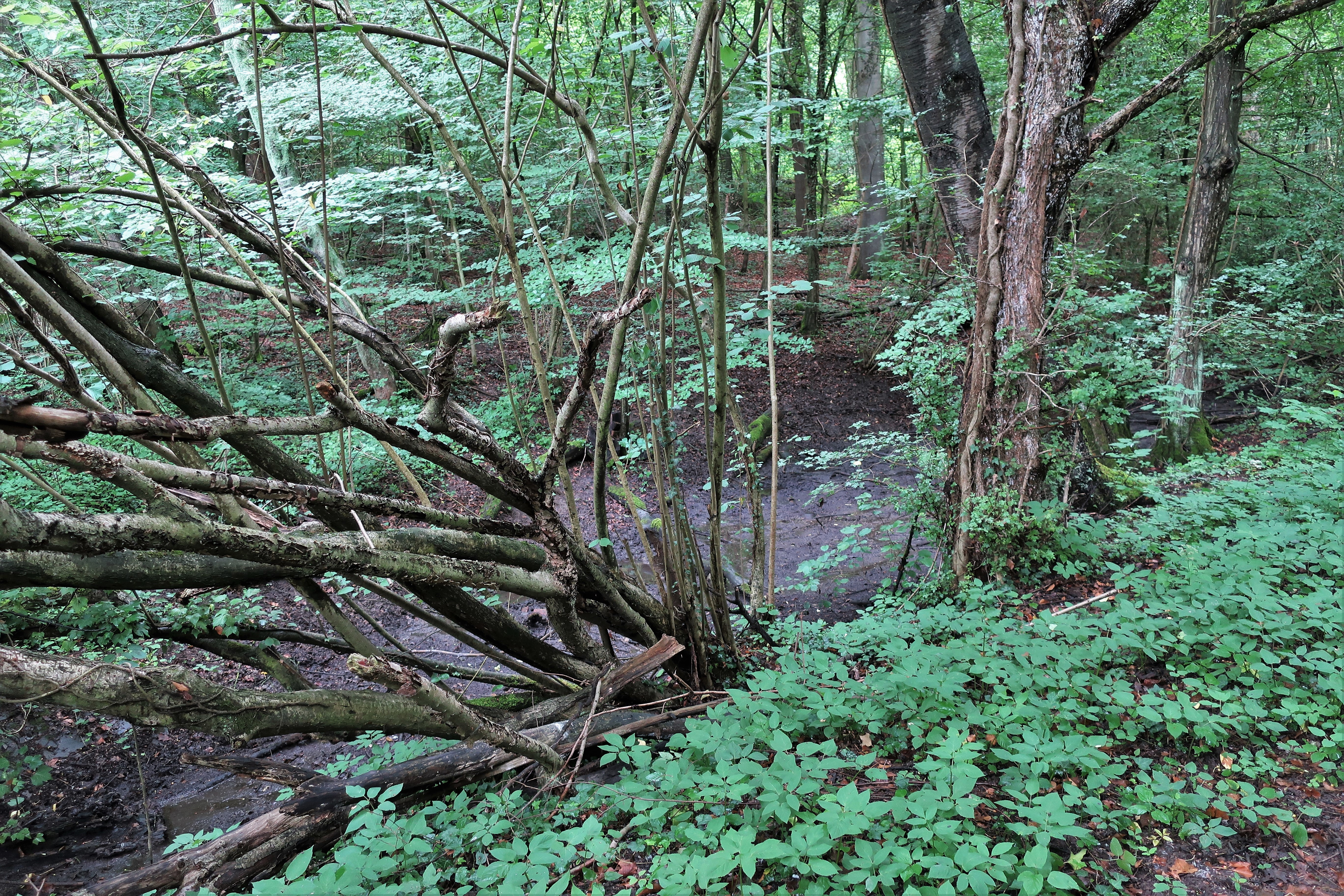 Geschützter Landschaftsbestandteil 1.4.2.39 „Herbecker Siepen“ in Hagen, zwischen Hohenlimburger Straße und der A 46 östlich von Herbeck. Es handelt sich um einen Bachlauf mit angrenzenden Wiesen- und Brachestreifen sowie den östlich anschließenden, bewaldeten Talhang. Im Bereich der ehemaligen Hofstelle wurde das Bachbett verlegt und eine Aufschüttung vorgenommen.